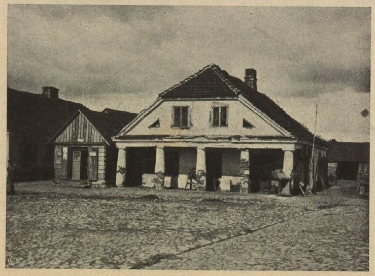 Materiały z wystawy Architektury Polskiej, urządzonej w 1915 r. staraniem Koła Architektów i Towarzystwa Opieki nad Zabytkami Przeszłości w Warszawie.